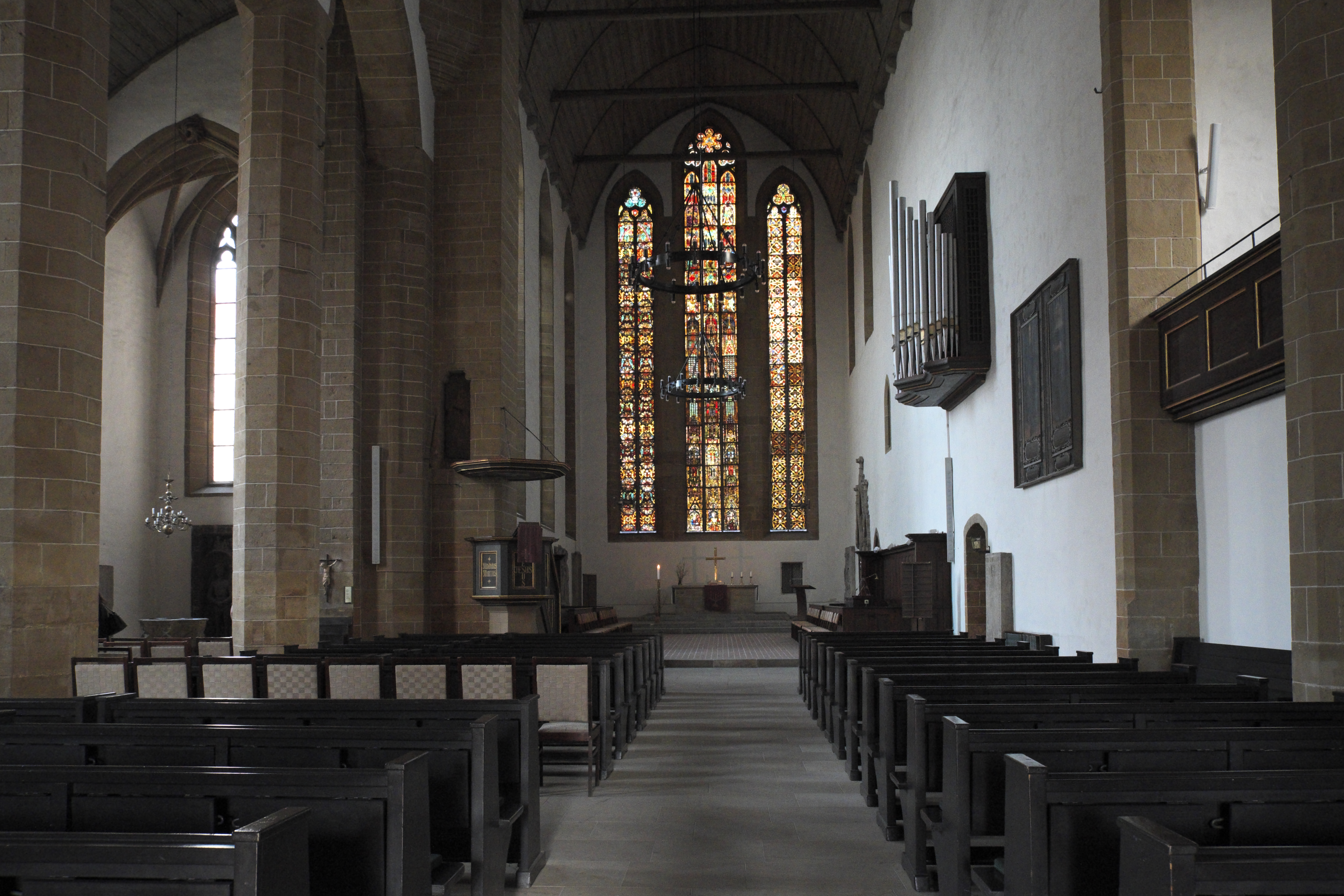 Kirche des ehemaligen Augustinerklosters in Erfurt in Thüringen (Deutschland), Innenraum